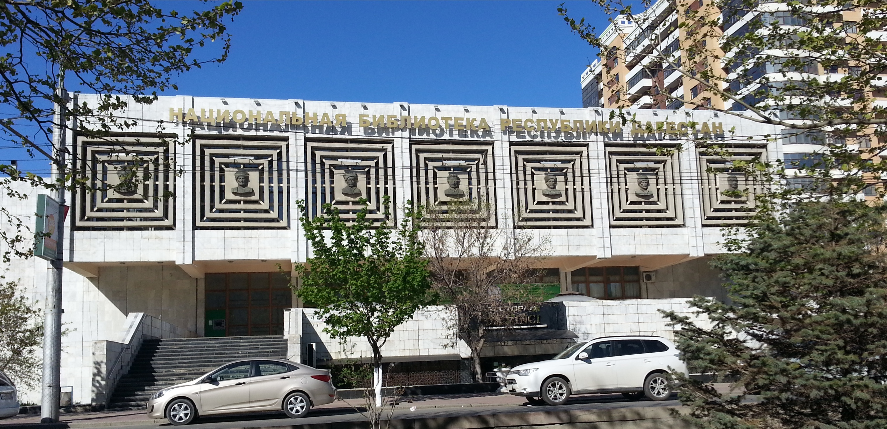 Национальная Библиотека Дагестана